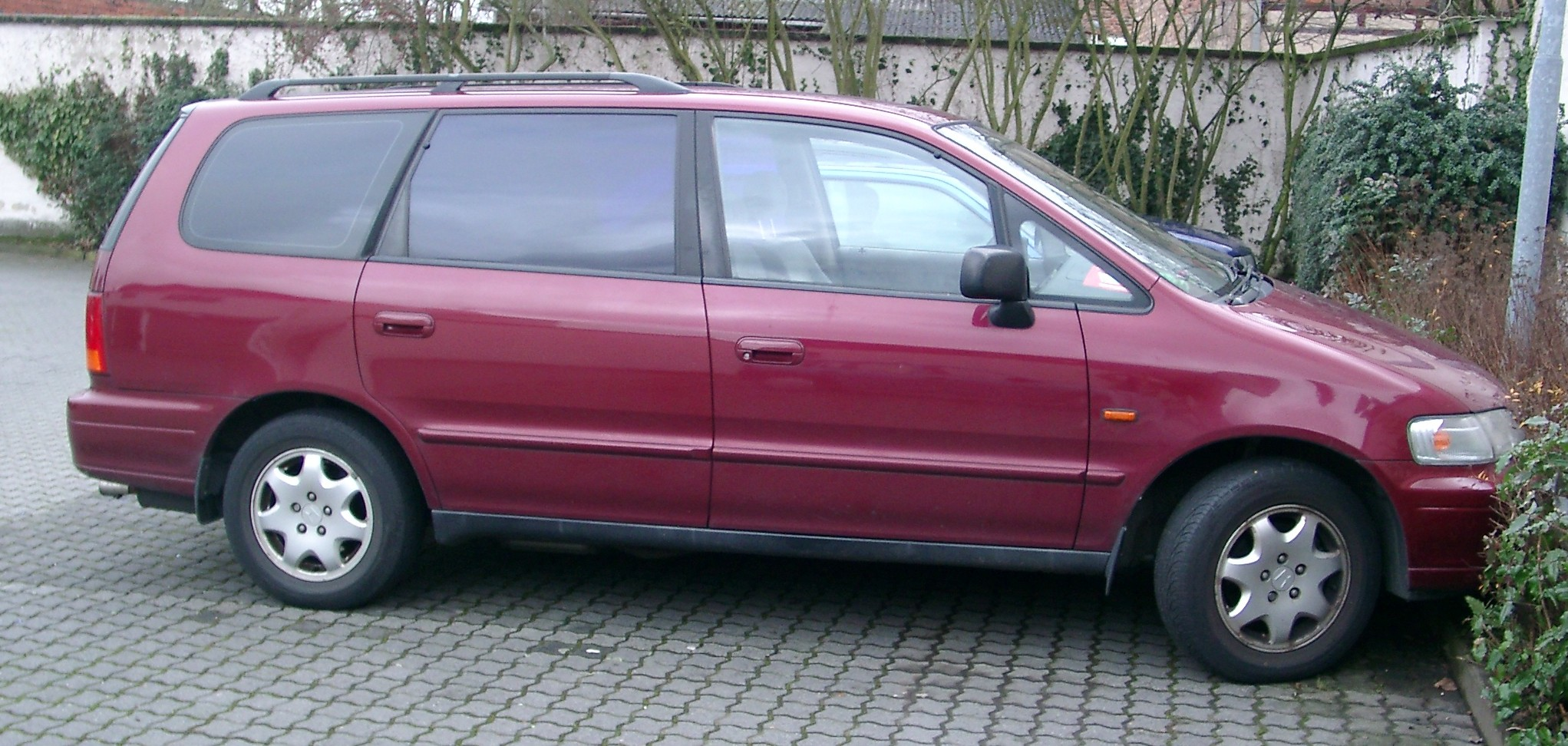 Honda Shuttle